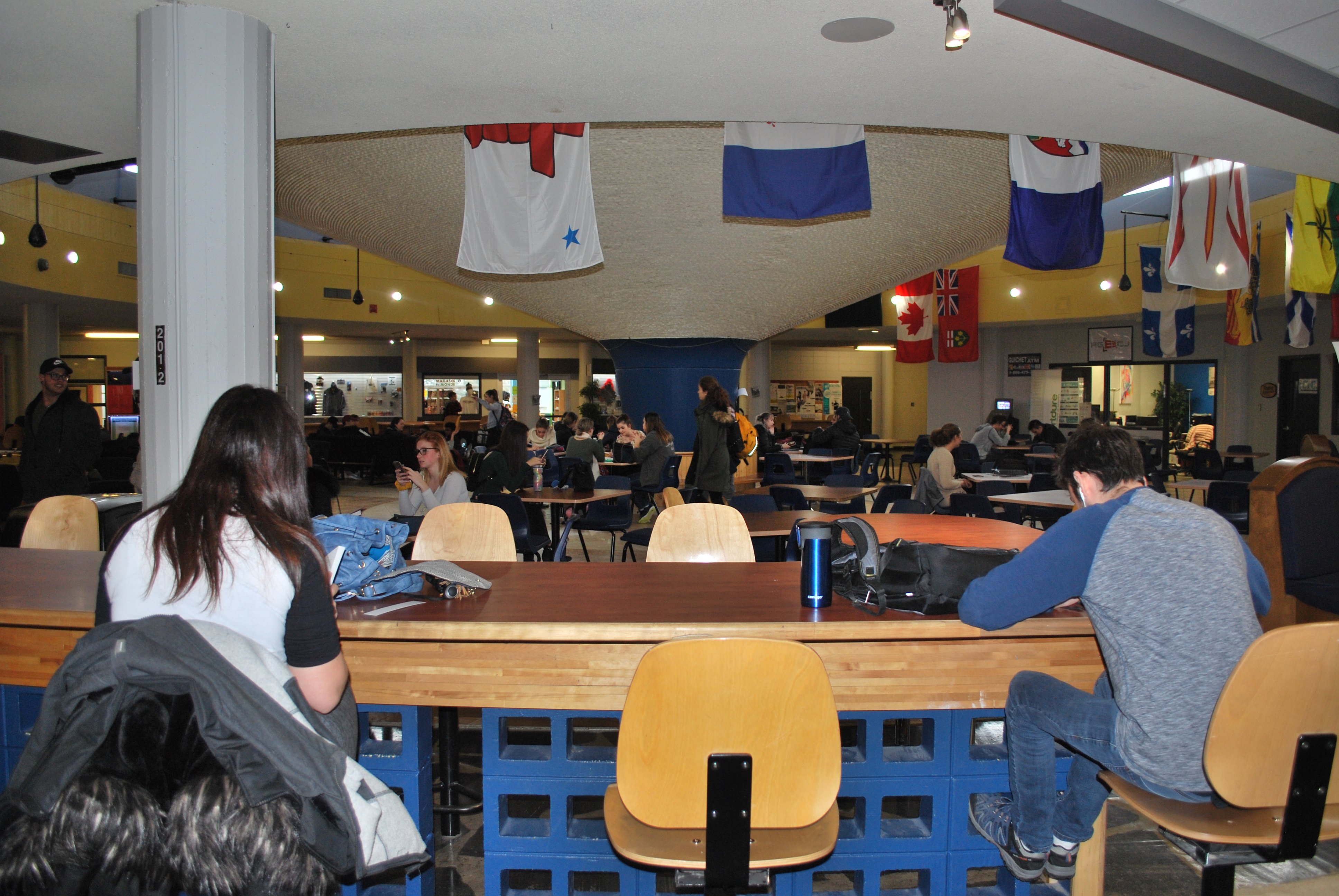 Centre social - Les Pas Perdus